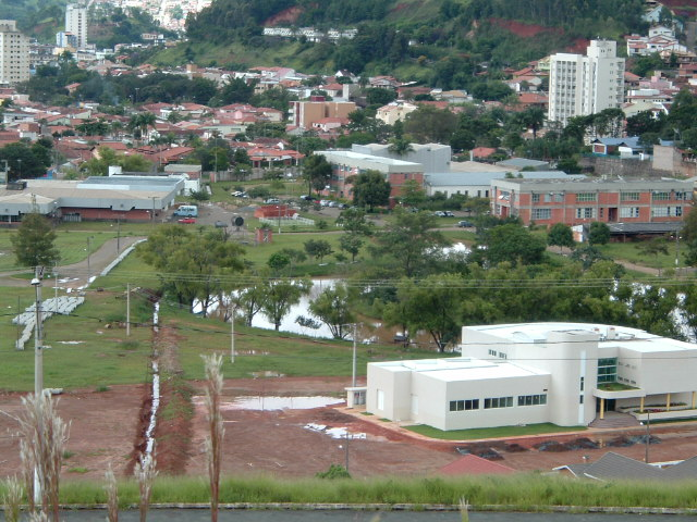 Vista de parte da Unifei e o Lago